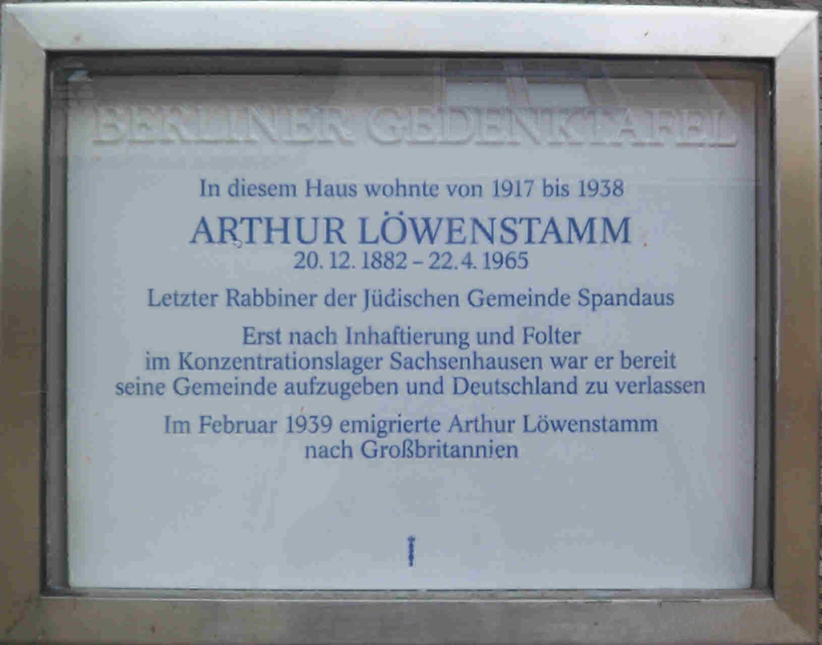 Gedenktafel Arthur Löwenstamm